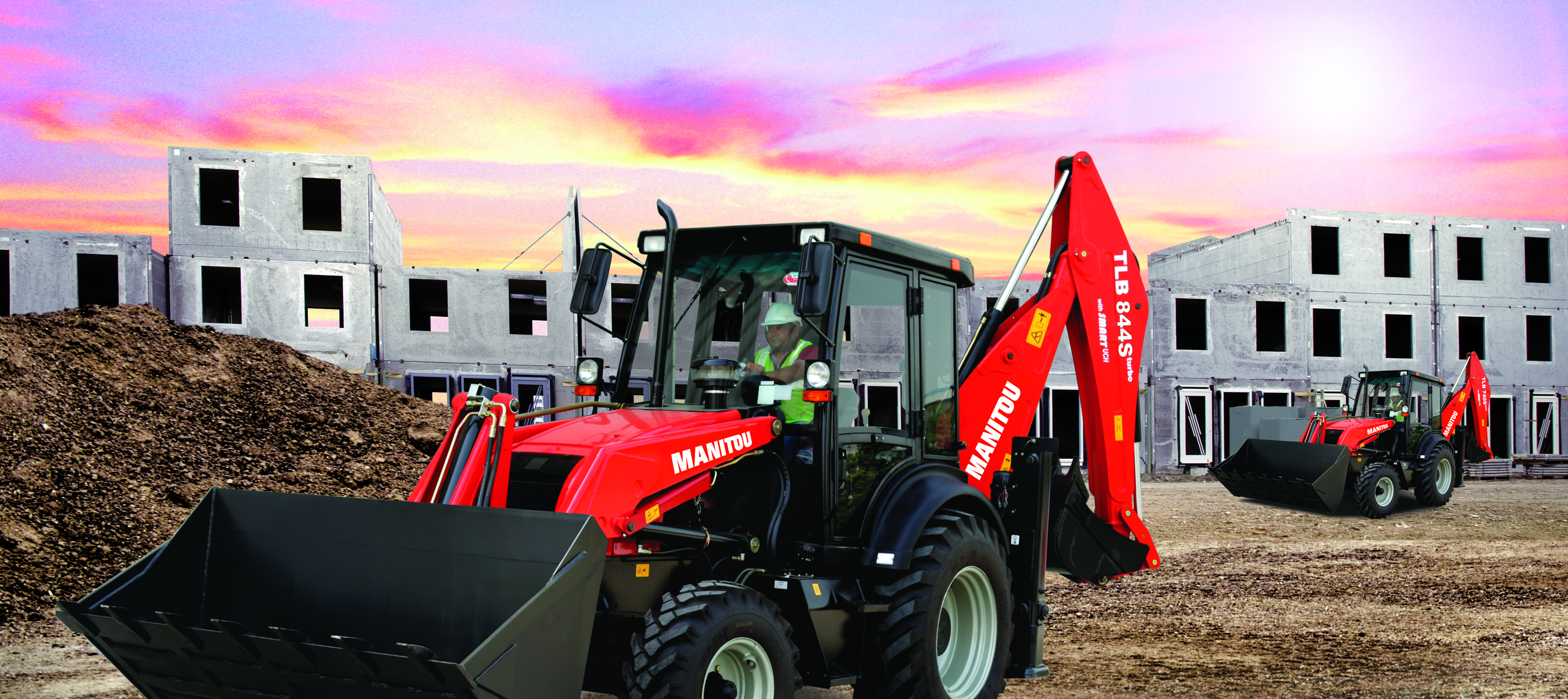 TLB, tractopelle